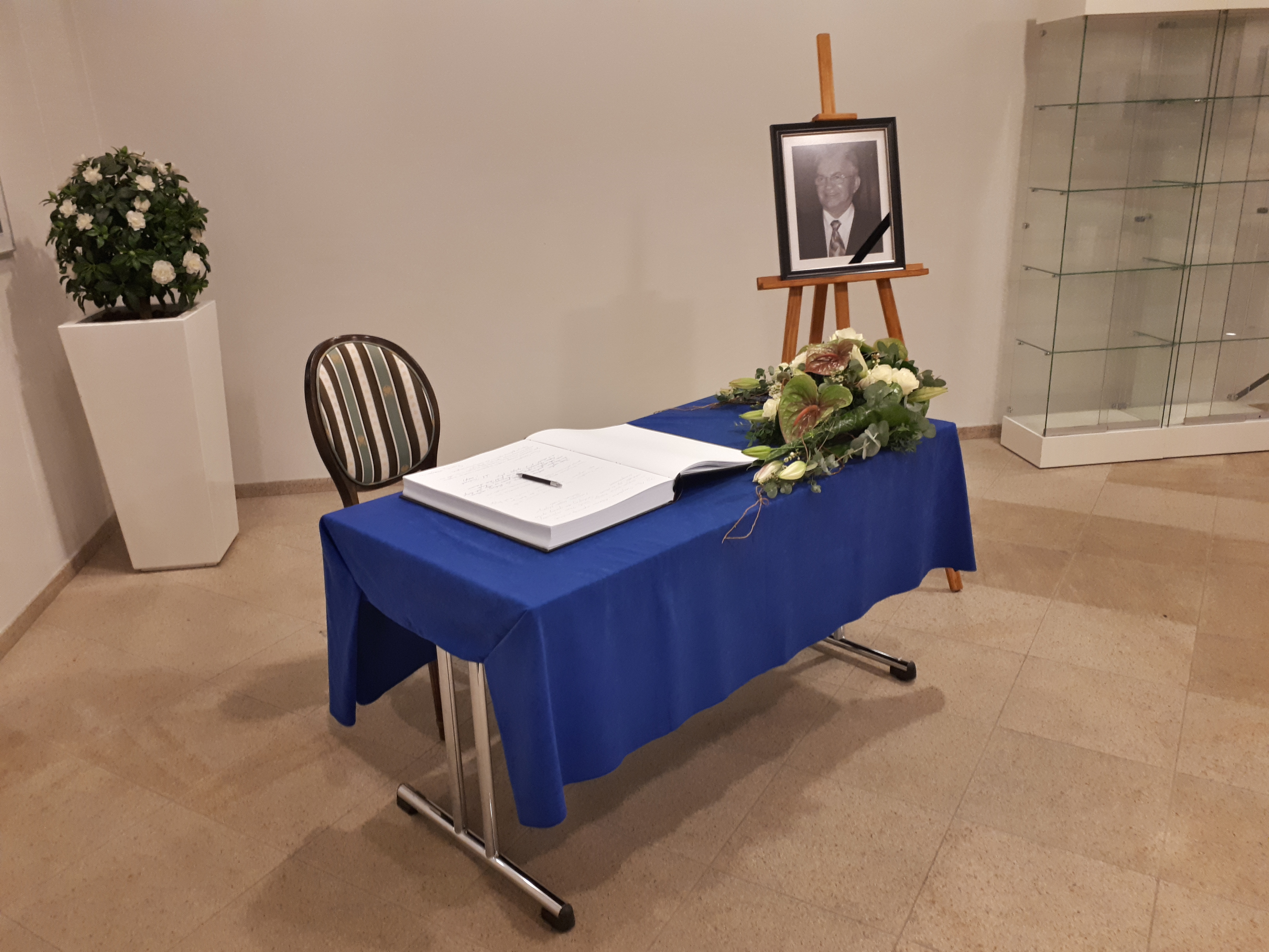 Księga kondolencyjna po śmierci byłego prezydenta Elbląga Henryka Słoniny w Ratuszu Staromiejskim w Elblągu.